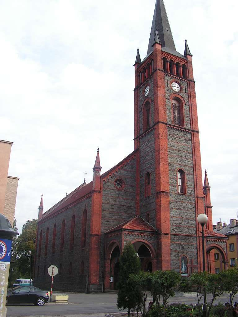 Niemcza - Kościół św. Piotra i Pawła